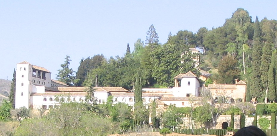 Generalife, Alhambra (Granada), Spain